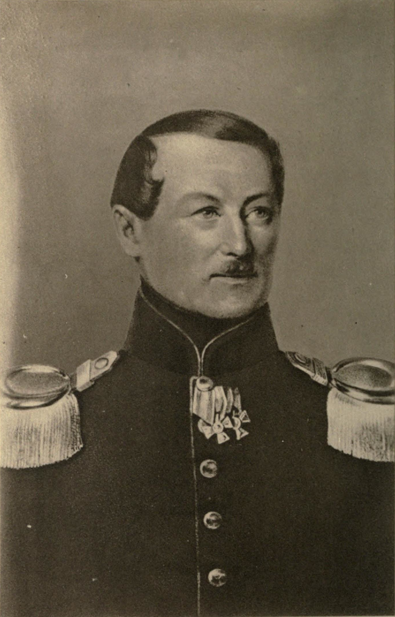 Porträt des preußischen Majors Meno Burg